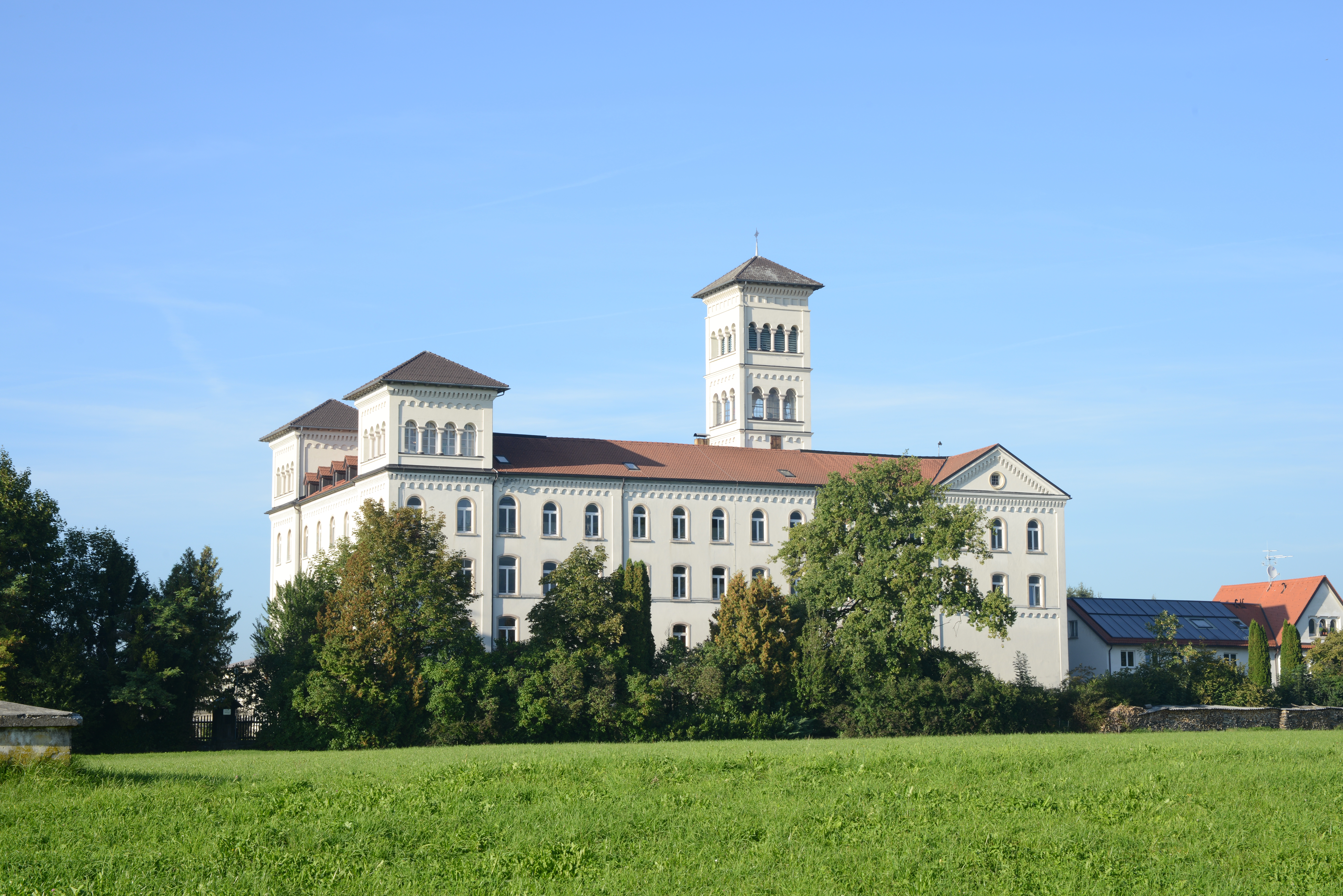 Salvator-Kolleg Lochauerstraße 107 in Hörbranz, Vorarlberg.